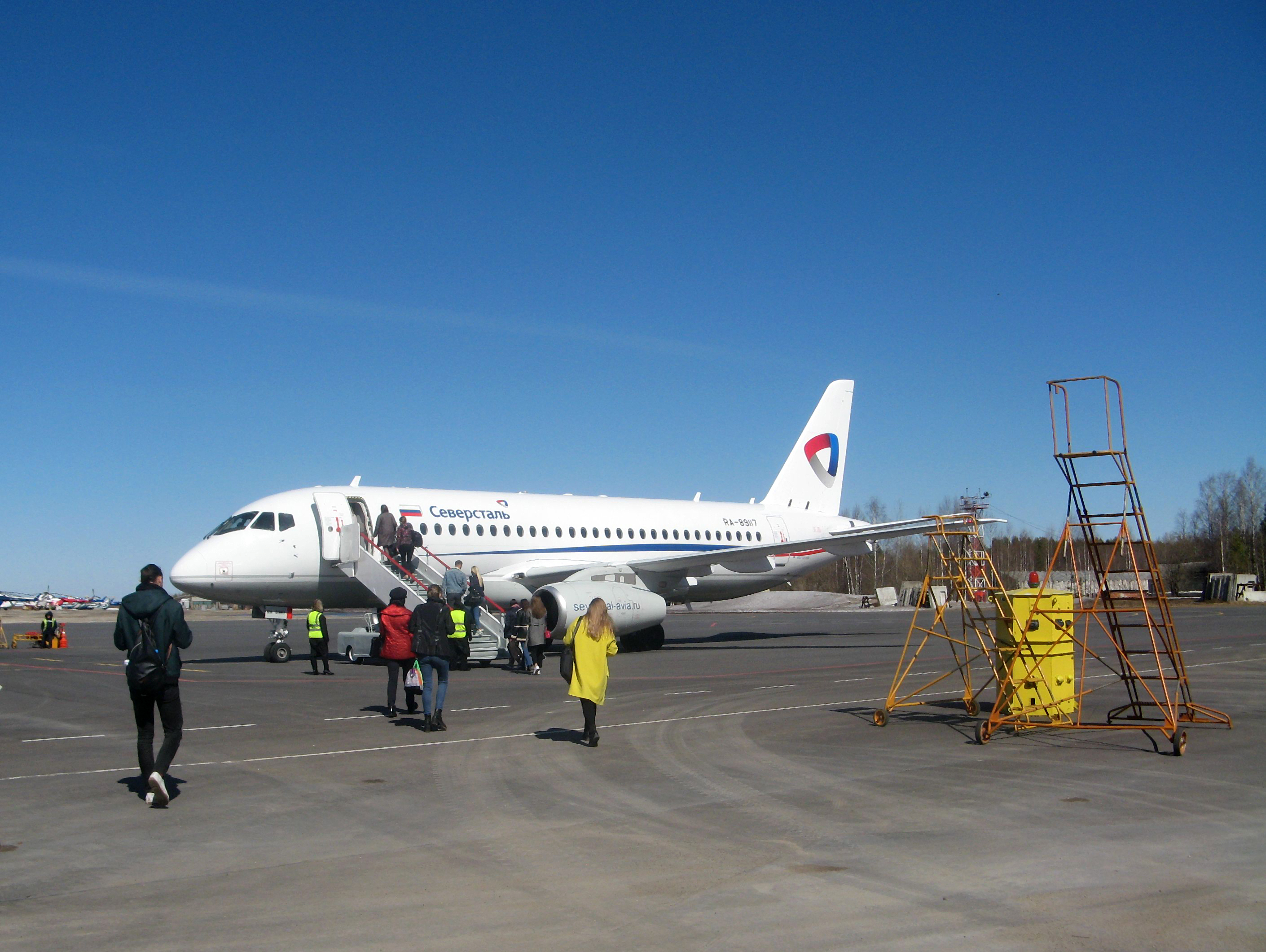 Ухта. Аэропорт